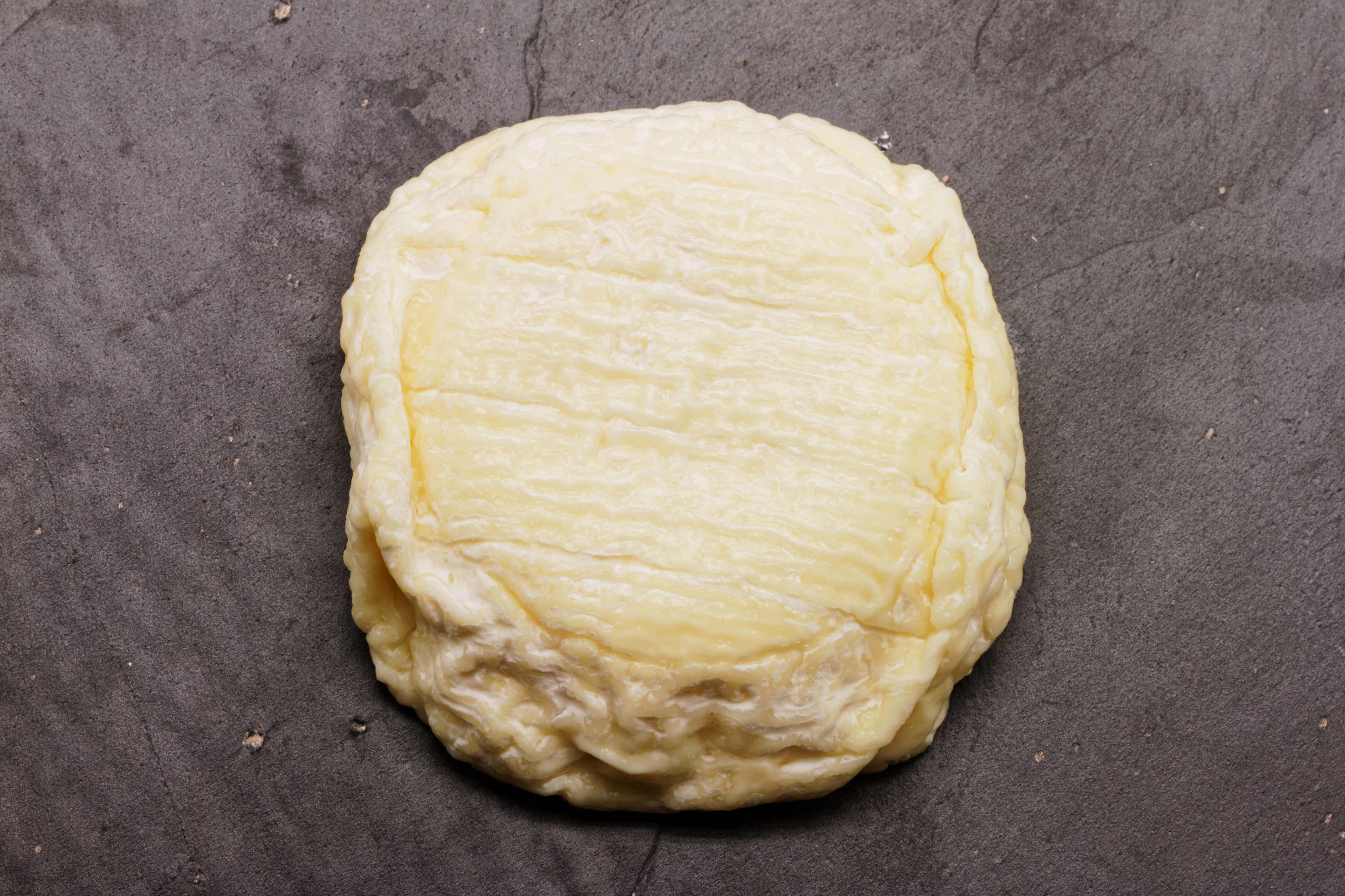 Un Saint-marcellin, fromage du Dauphinois.